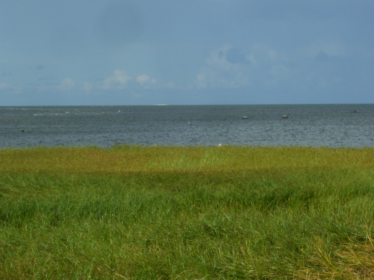 Vaade Kakralaiule Sääre ninalt (Pühalepa vald, Hiiu maakond)